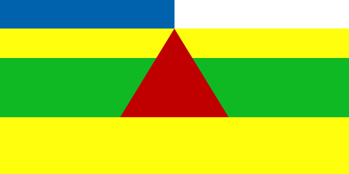 Bandera de la Parroquia Huertas - Zaruma - El Oro - Ecuador